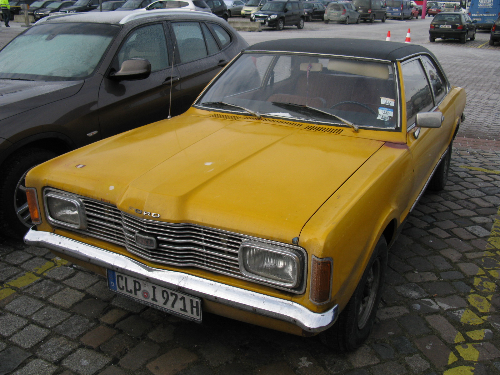 Ford Taunus GXL